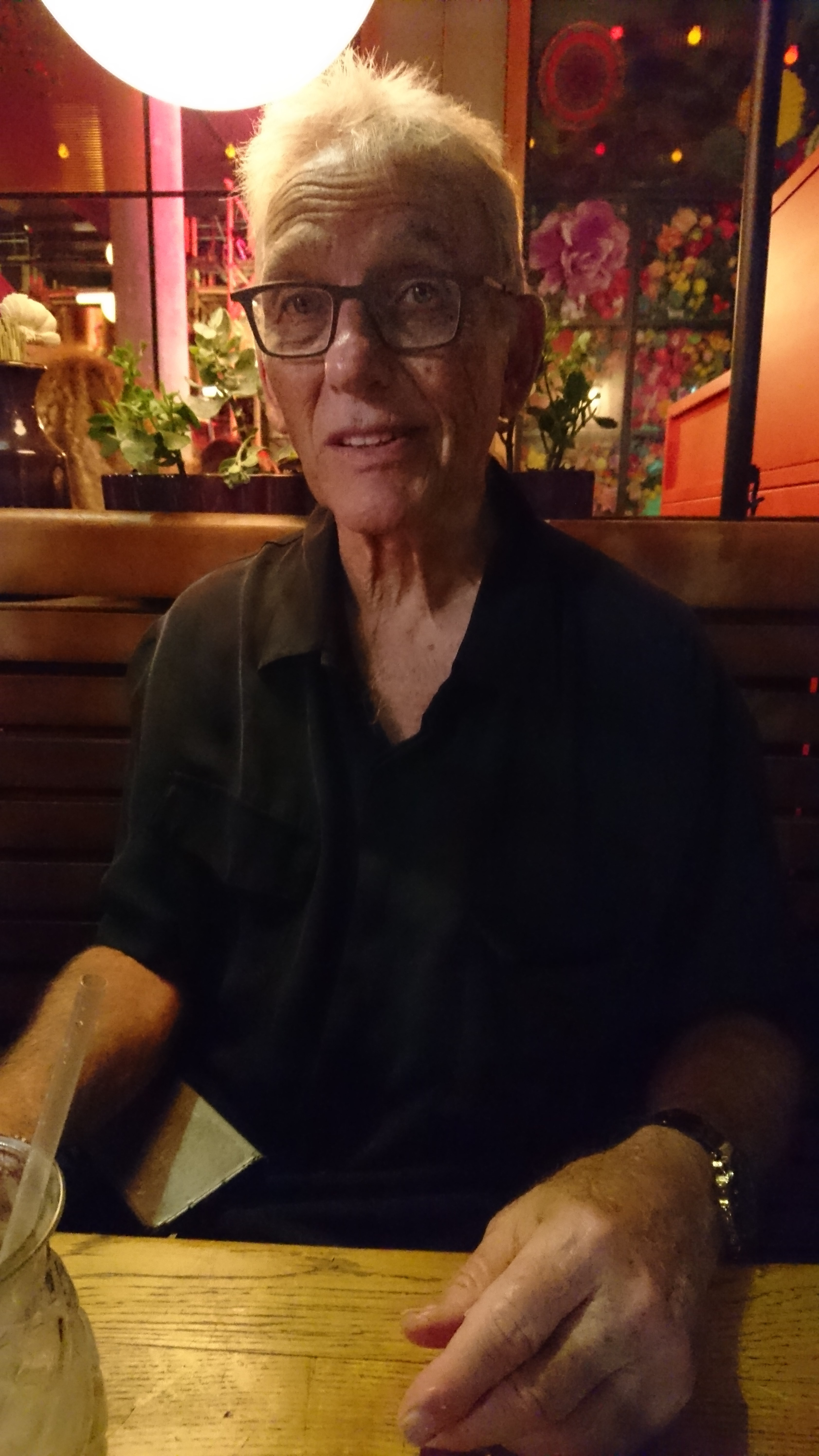 תמונה של המלחין יוסי מר חיים, צולמה בשנת 2018